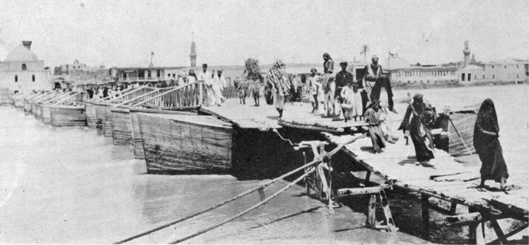 Baghdad, Iraq